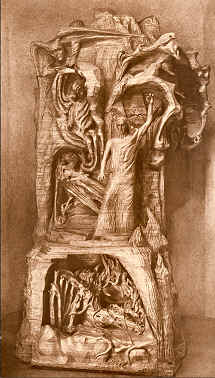 Groupe en bois d'orme sculpté par Rudolf Steiner et Edith Maryon, situé au Goetheanum, à Dornach, en Suisse. Il manifeste au centre le Représentant de l'humanité luttant entre Lucifer et Ahriman pour les équilibrer. Ce combat se déroule à l'intérieur de chaque homme, qui a le choix de favoriser l'un ou les deux autres protagonistes par sa manière de vivre. A gauche est représenté la possibilité de victoire de Lucifer et Ahriman se rejoignant. En haut à gauche est représenté le regard du monde spirituel sur ce combat, ce regard est aussi décrit comme l'humour du monde. On lira, avec profit à ce sujet, les livres Lucifer et Ahriman et L'homme entre Lucifer et Ahriman de Rudolf Steiner.